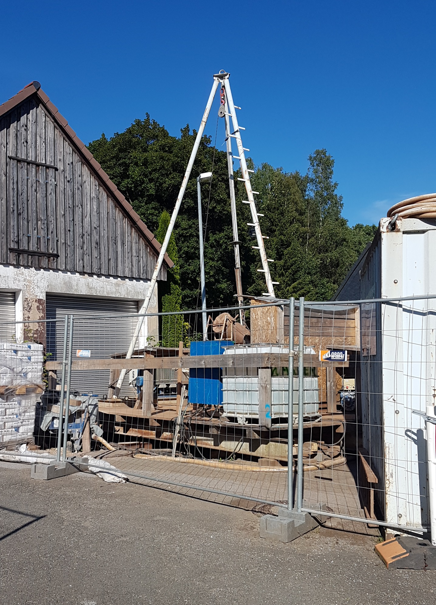 Baustelle zur Verwahrung des Schachtes Silberkrone in Zellerfeld, Blick von Westen.